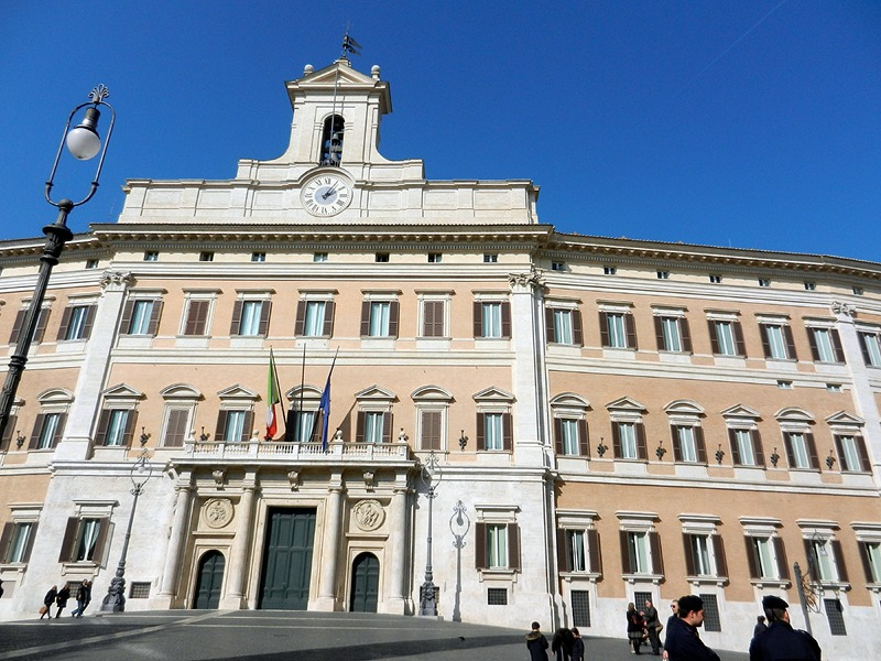 Roma - Palazzo di Montecitorio